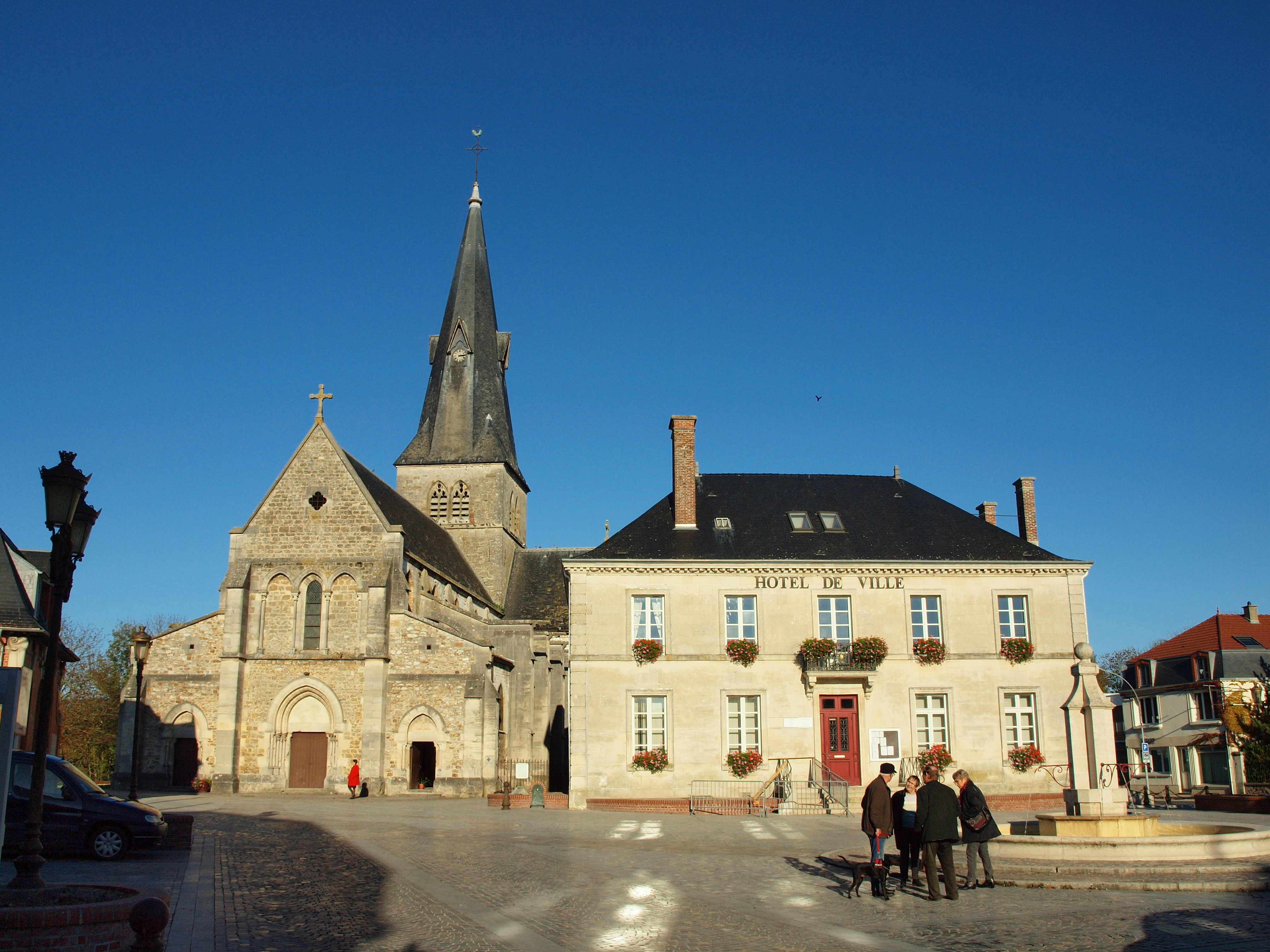 Suippes (Marne, France)